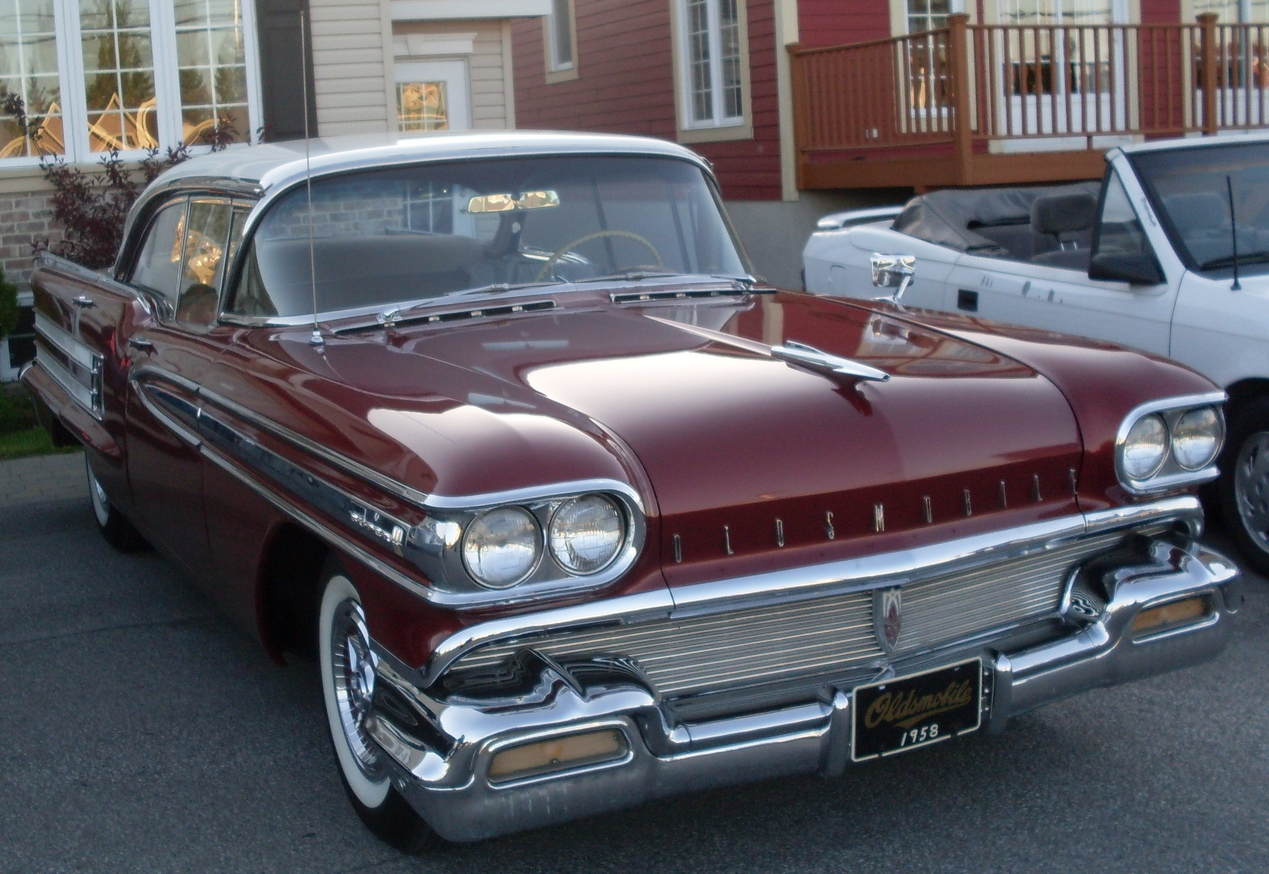 1958 Oldsmobile Super 88 photographed in St. Lin/Laurentides, Quebec, Canada at Auto classique St-Lin/Laurentides.